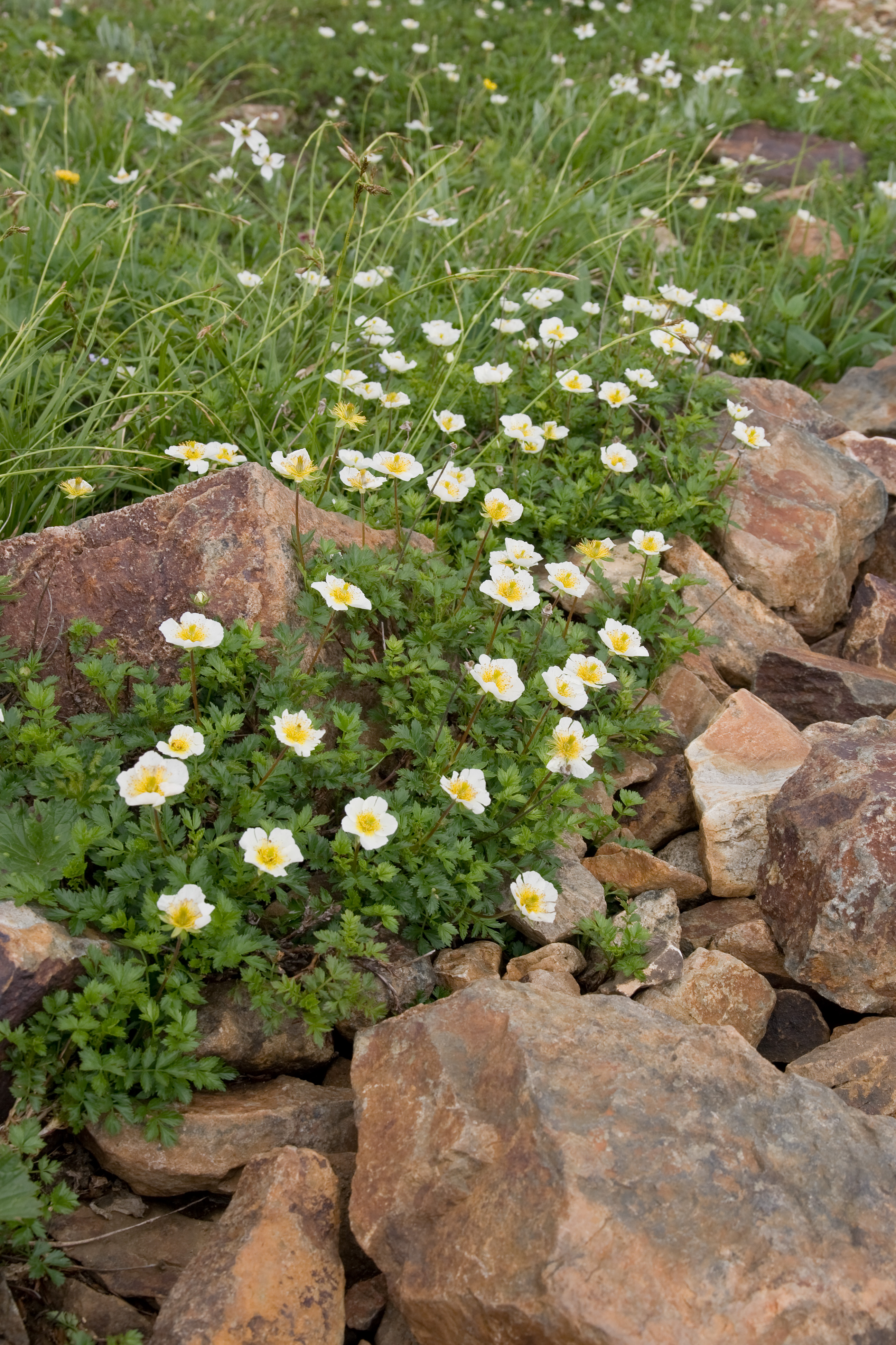 チングルマ (学名:Geum pentapetalum)